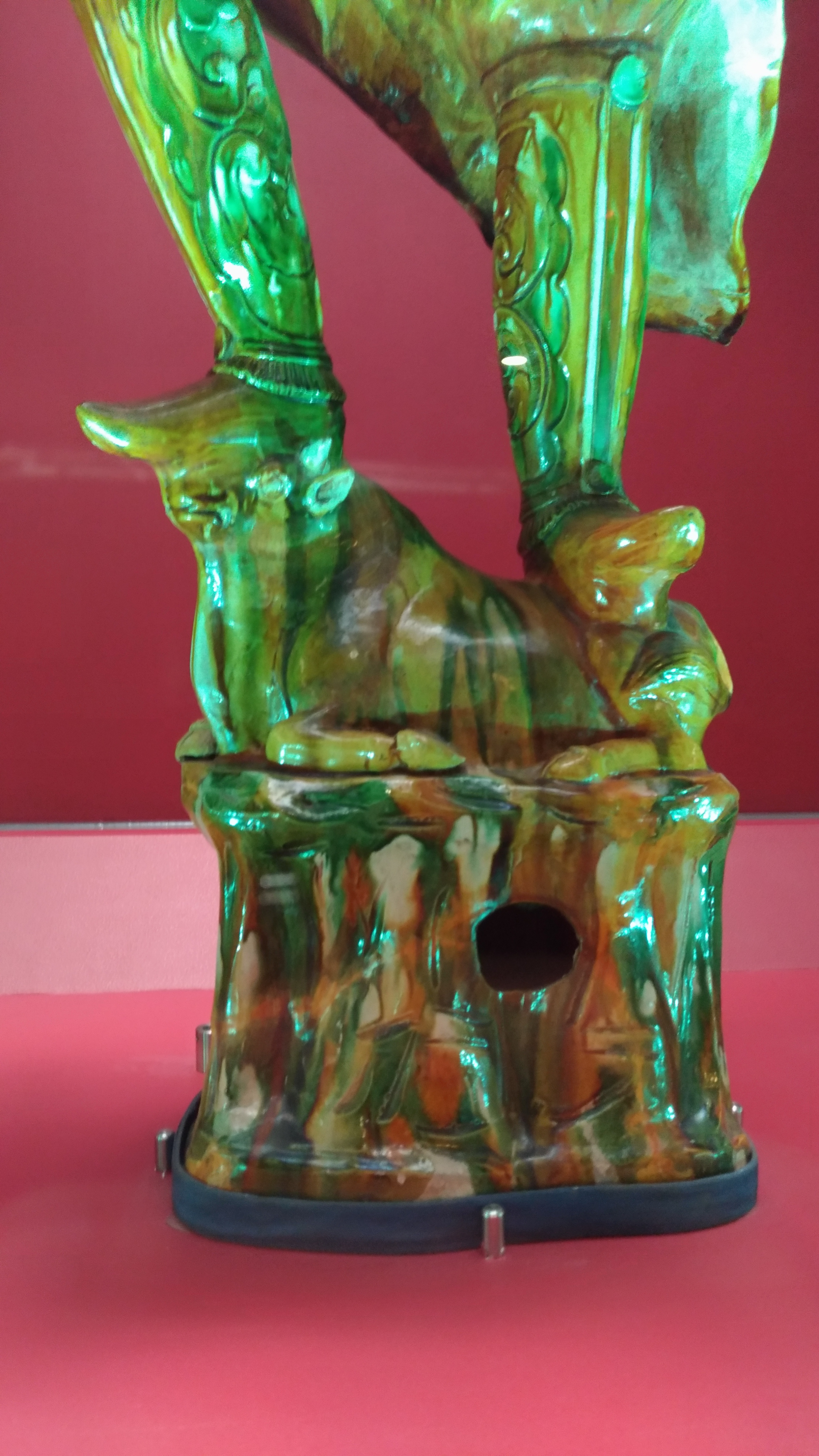 中文（台灣）: 台北國立故宮博物院所藏的三彩增長天王像腳下的臥牛台座